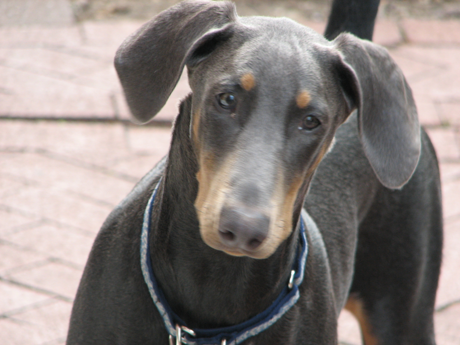 Blue Doberman Pinscher.